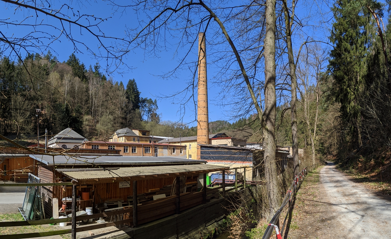 Porschdorf (Bad Schandau): Blick auf das Areal der ehemaligen Frinztalmühle